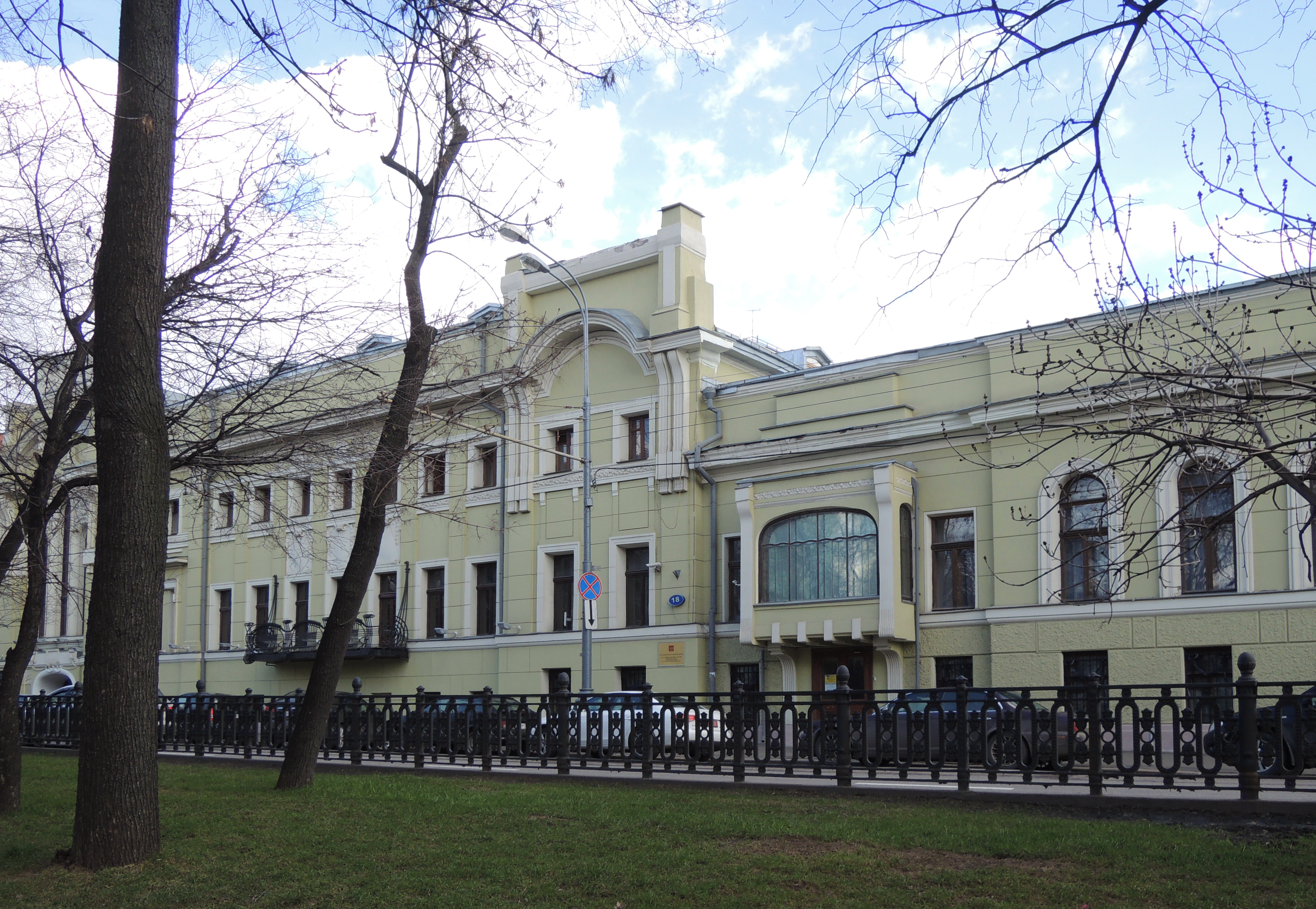 Тверской бульвар. № 18